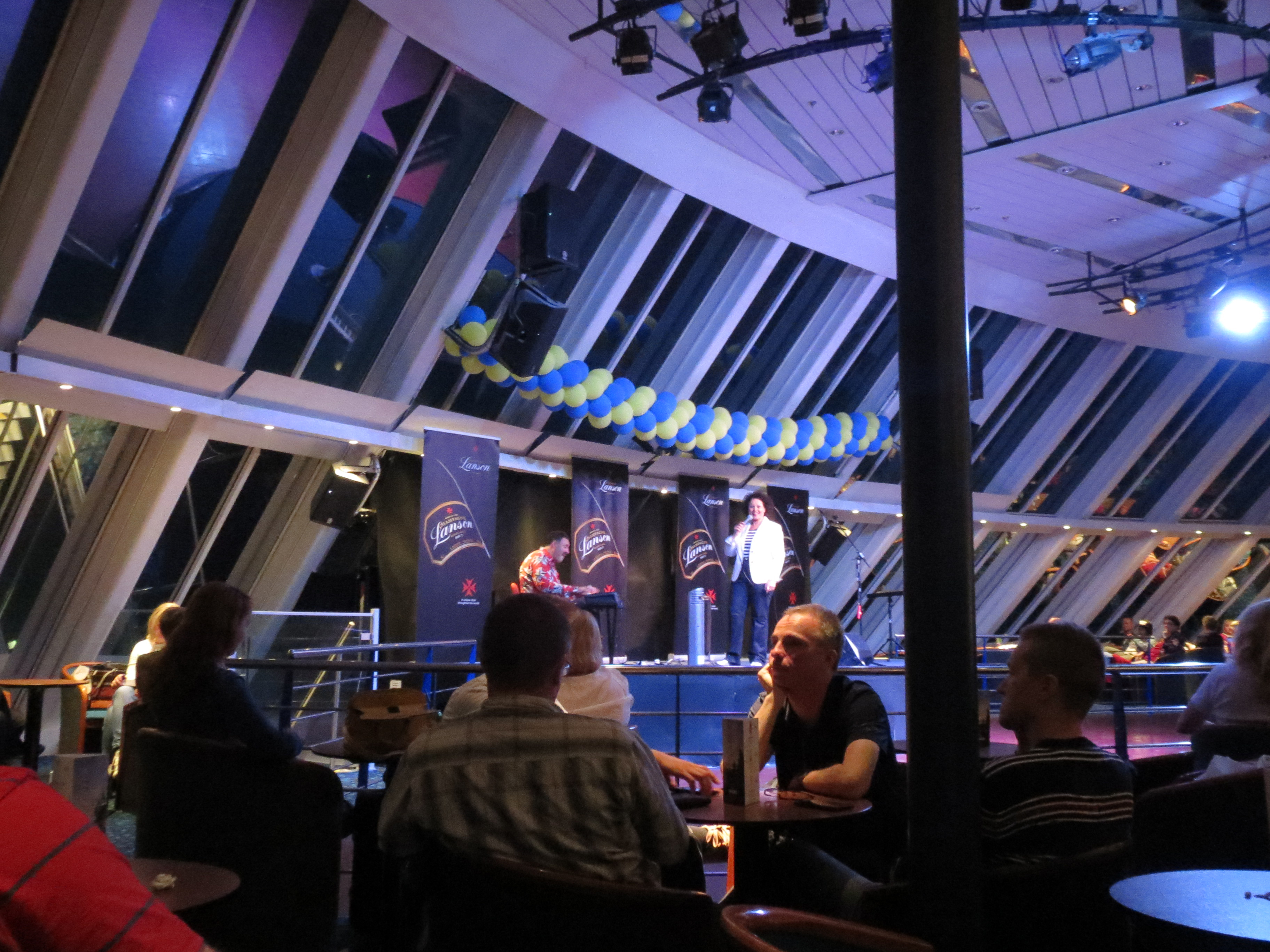 Bianca Morales esiintyy Tallinna–Helsinki-välillä autolautalla